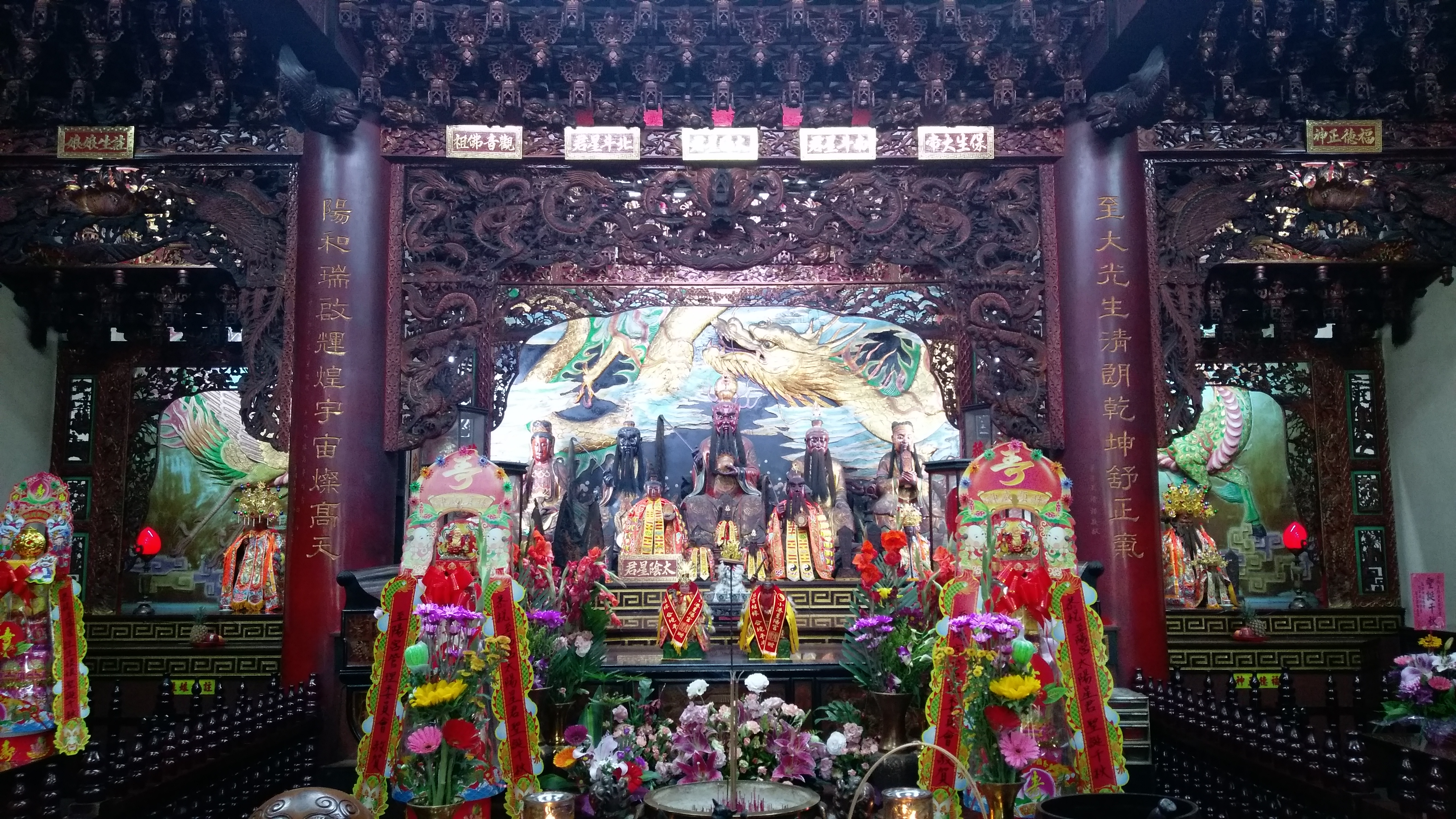 中文（台灣）: 小港至陽宮正殿